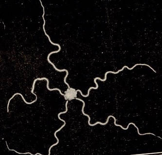 Amphipholis squamata (Delle Chiaje, 1828) Small Brittle Star